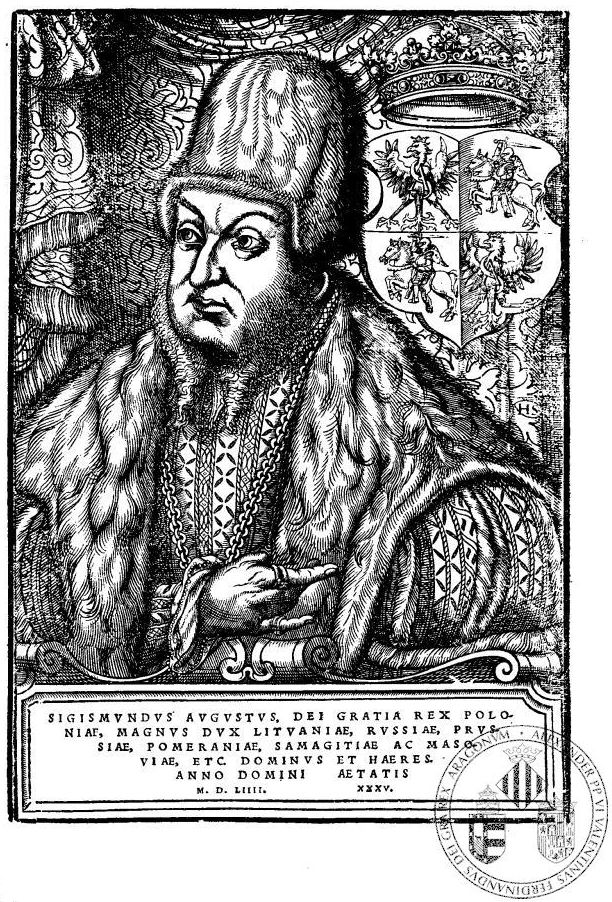 Sigismund II Augustus